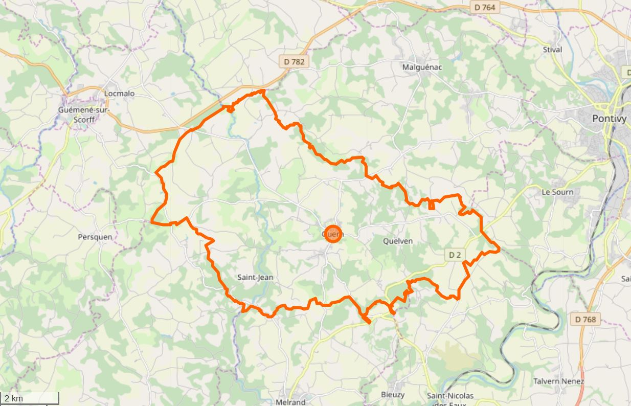 Cette carte a été créée à partir des données du site Openstreetmap. This map may be incomplete, and may contain errors. Don't rely solely on it for navigation.